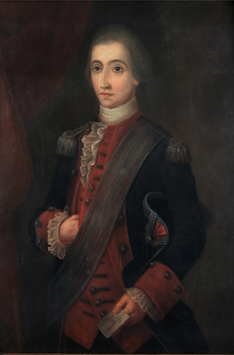 Retrato de Tomás de Figueroa y Caravaca. Tomás de Figueroa y Caravaca (Estepona (Málaga) 1747- Santiago de Chile, 1811) fue un militar español que llevó a cabo un infructuoso cuartelazo en Chile, conocido como Motín de Figueroa que tenía como objetivo suspender las labores de la Primera Junta Nacional de Gobierno y restablecer el orden colonial. Info de la pintura